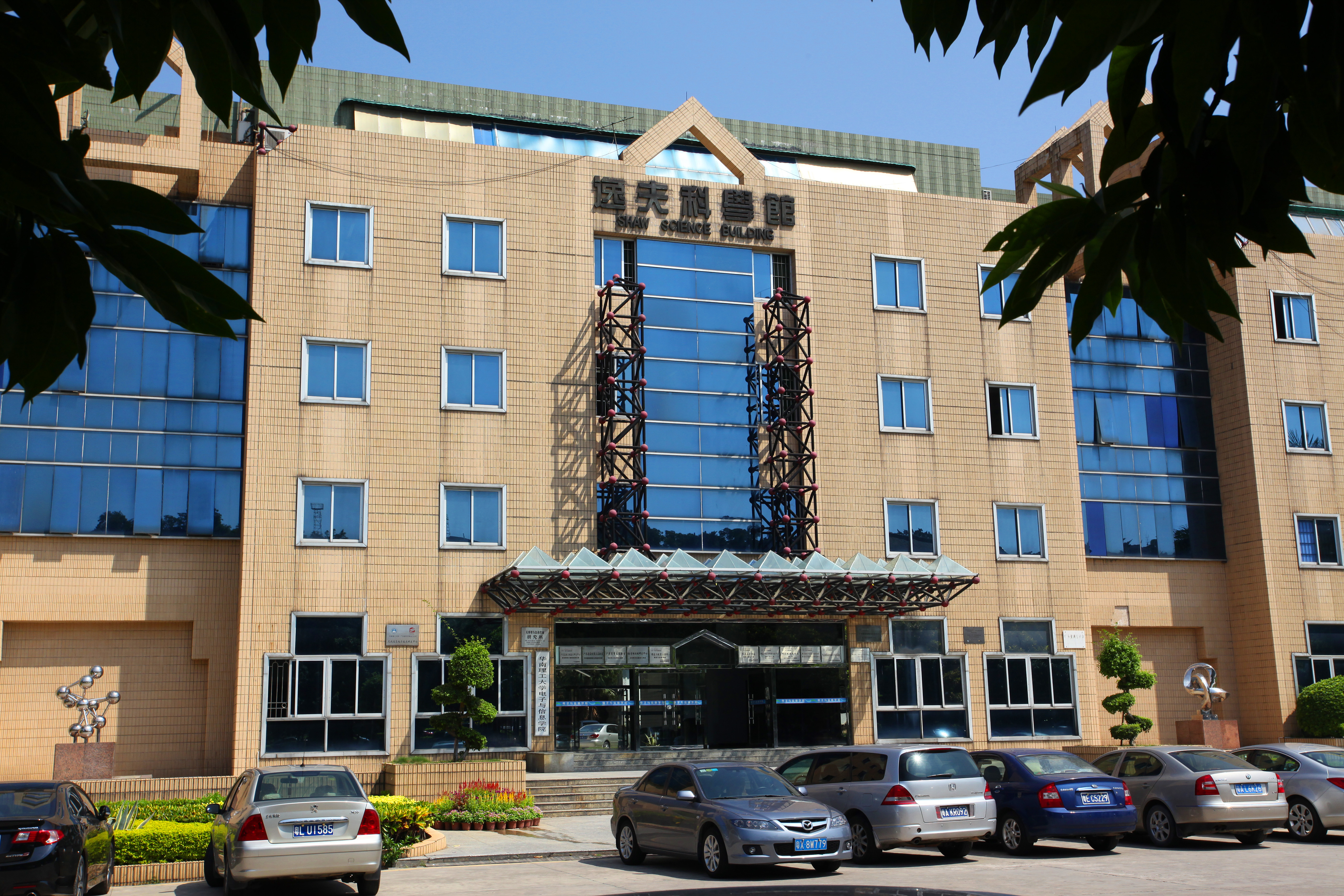 华南理工大学逸夫科学馆（电子与信息学院办公楼）